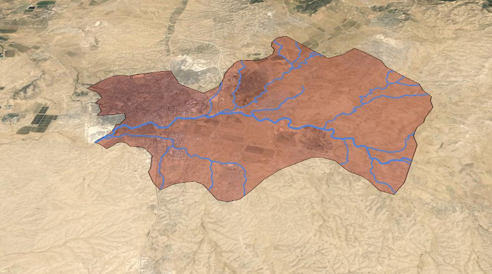 בקעת באר שבע והנחלים המנקזים אותה כבראשם נחל באר שבע